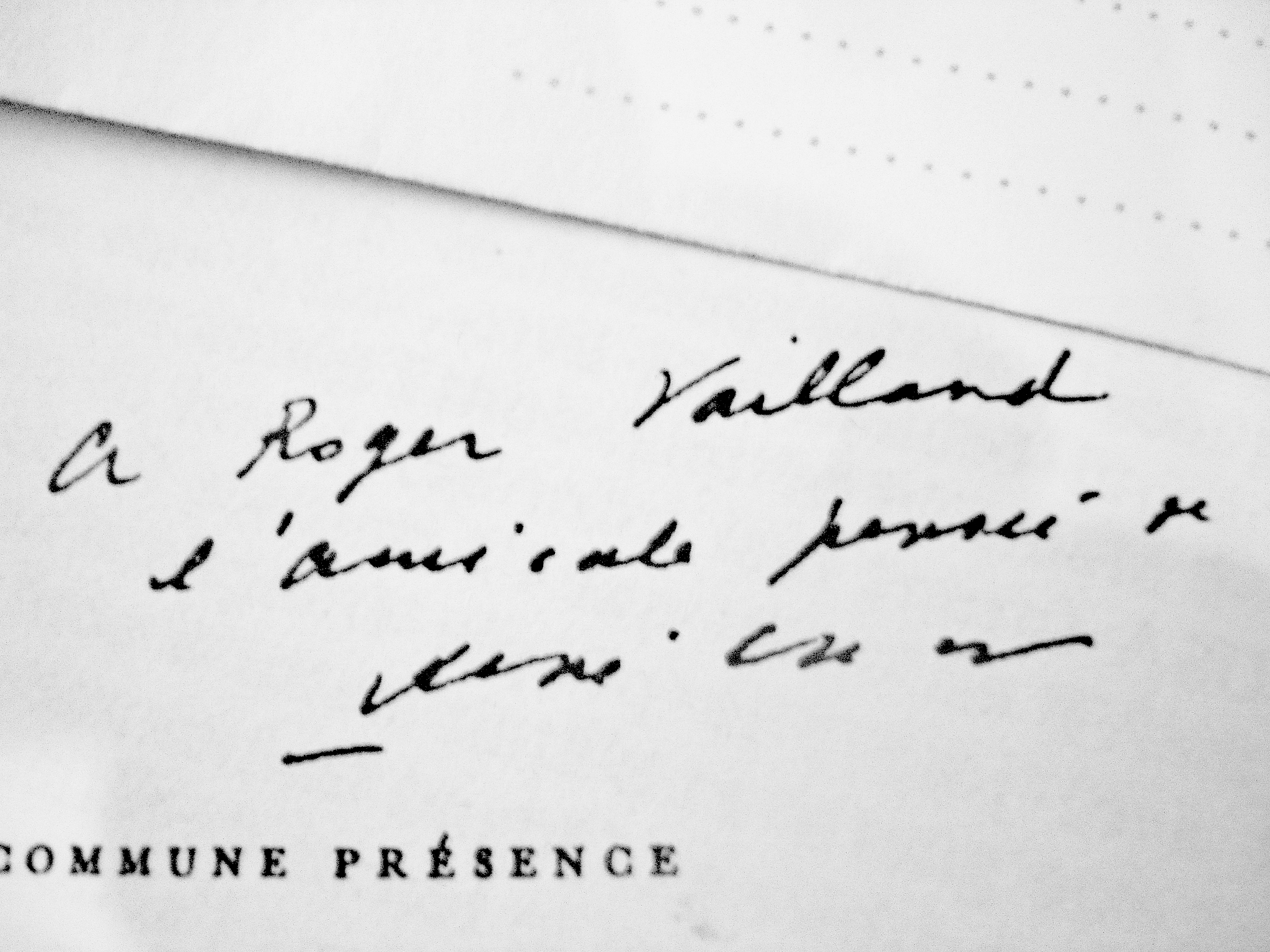 Dédicace du poète René Char à l'écrivain Roger Vailland : "Amicale pensée""